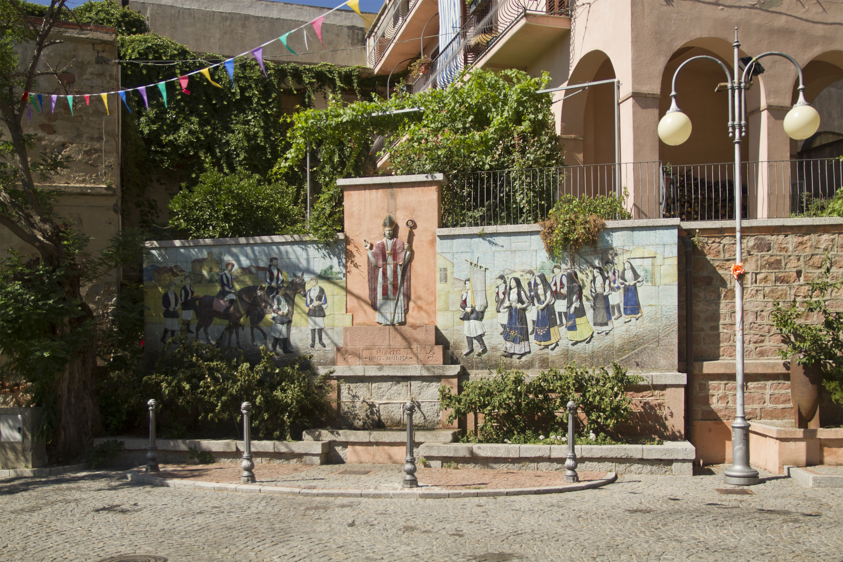 Fontana di Orgosecoro, Urzulei, Ogliastra, Sardinia, Italy